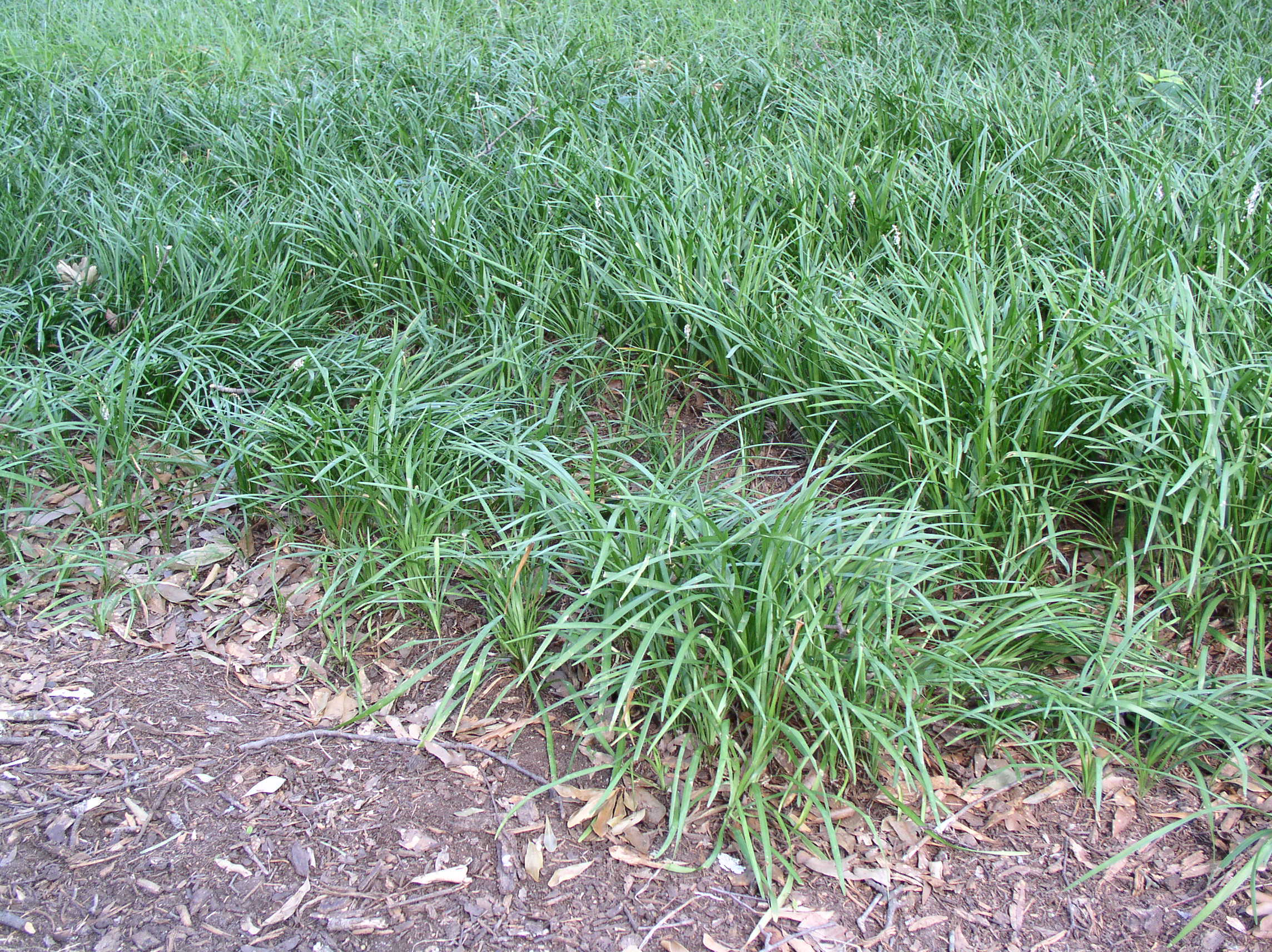 Mondo grass (ophiopogon japonicus)